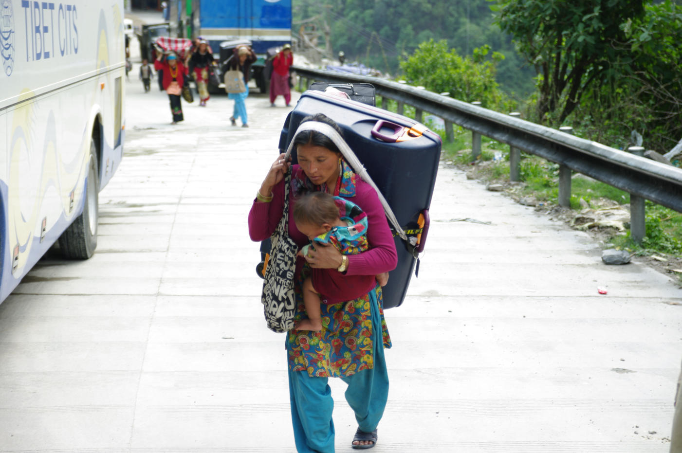 Kofferträger an Grenze Nepal-Tibet